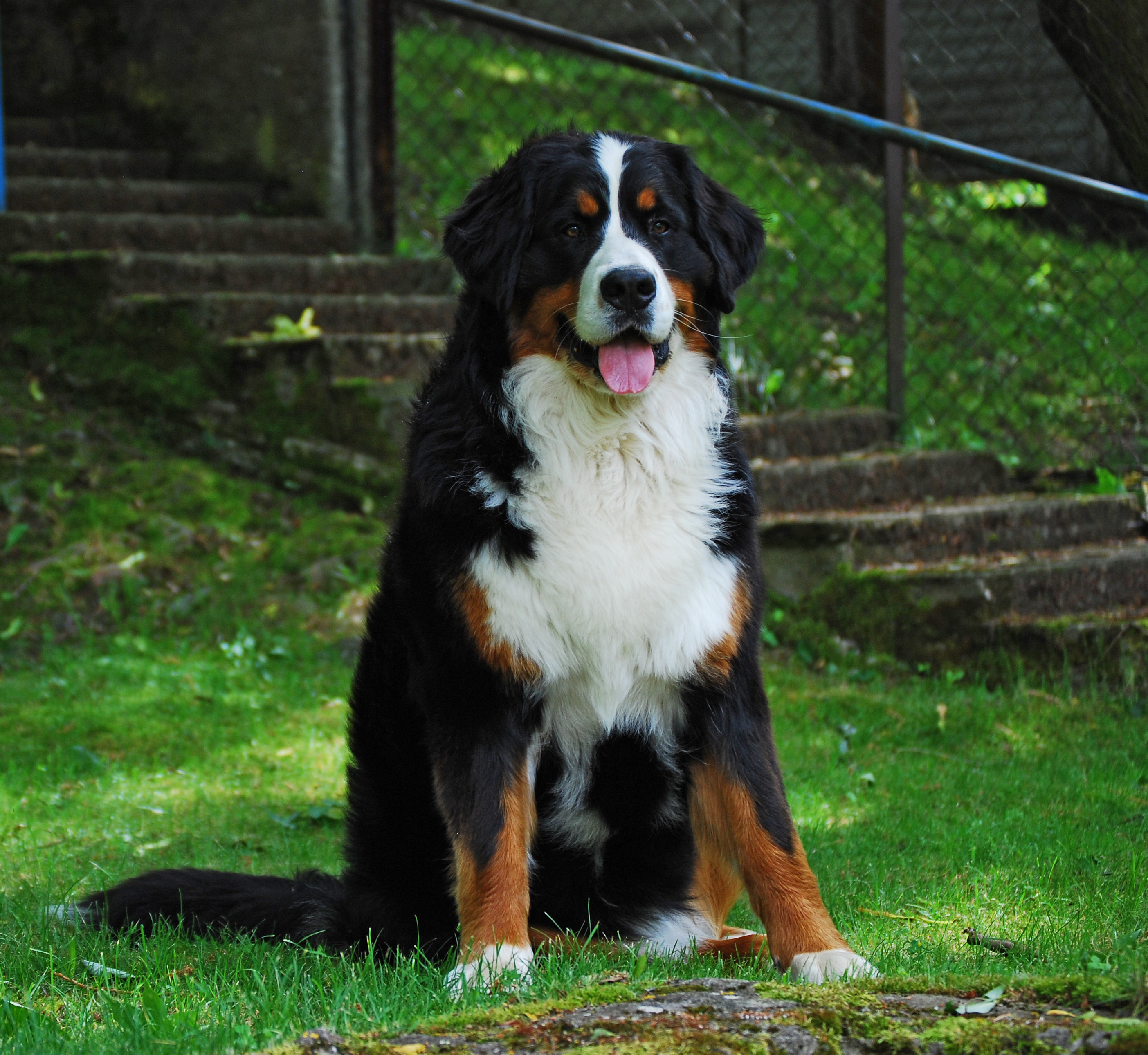 Female- 10 Months